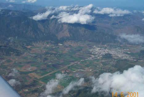 Esta es una vista tomada desde el aire donde se muestra gran parte del territorio del valle.